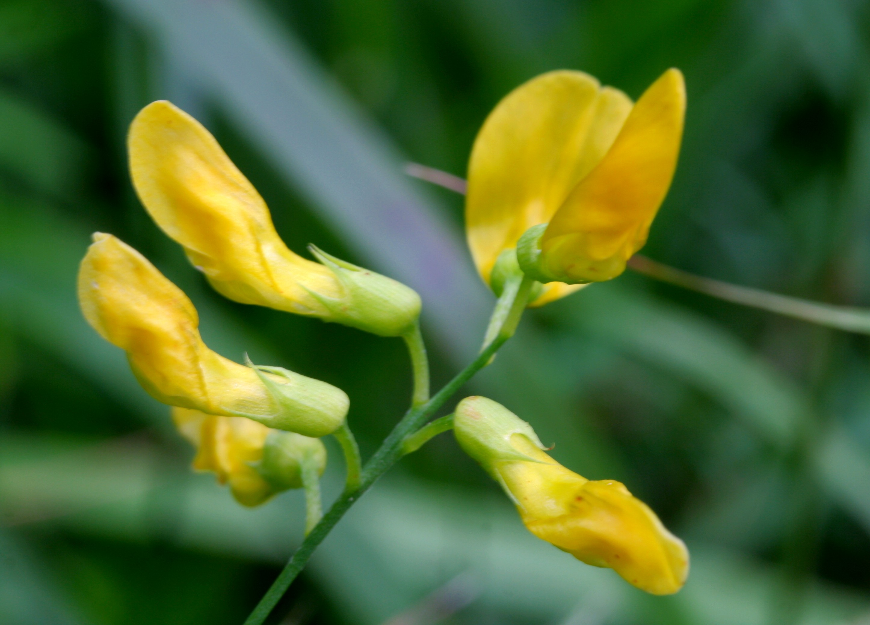 Lathyrus_pratensis (Cicerchia dei prati) Località Cortina (BL) 1300 m s.l.m.